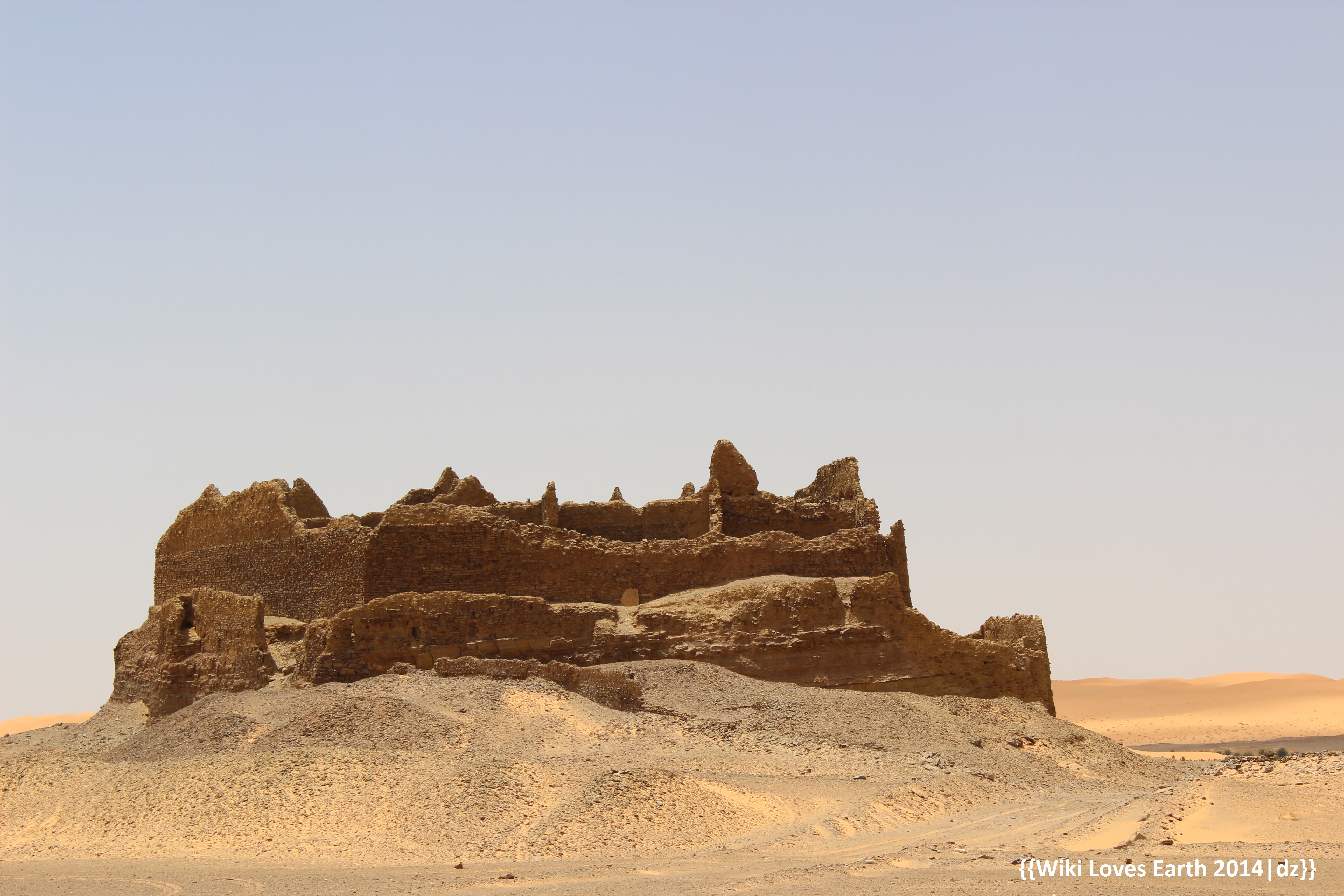 construction en terre